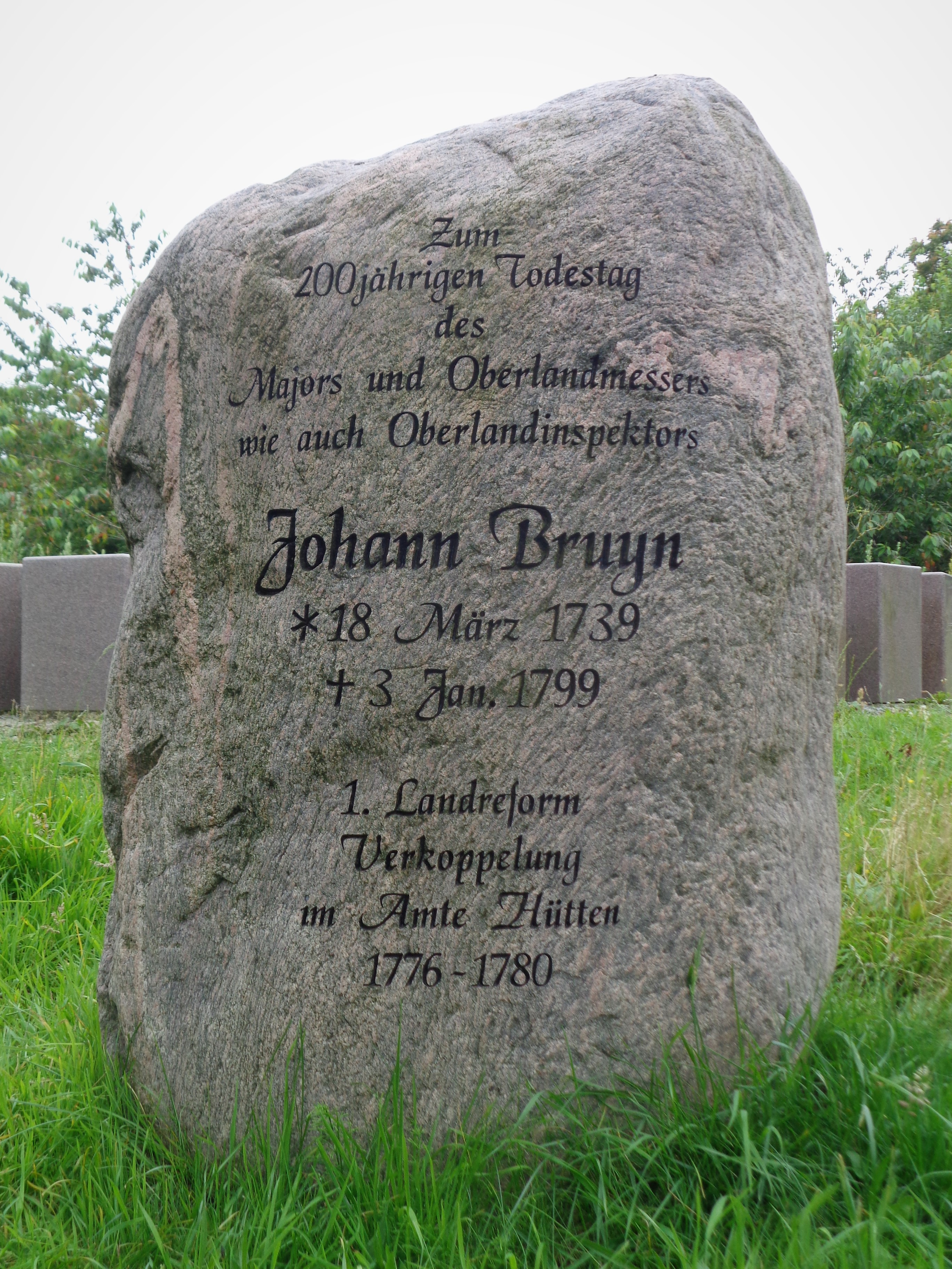 Gedenkstein auf dem schleswig-holsteinischen Aschberg. Im Hintergrund zu erkennen: der Steinkreis Aschberg.